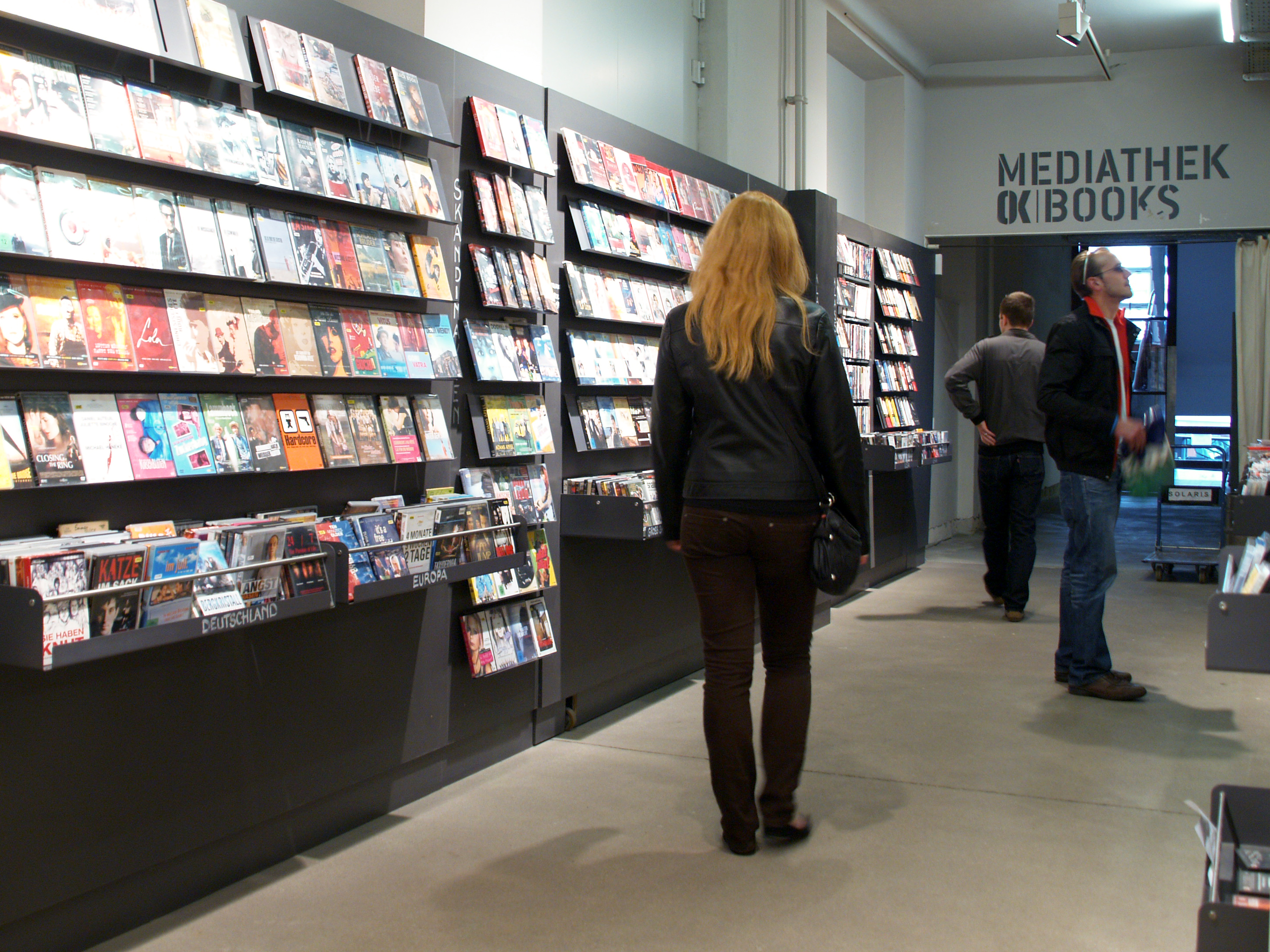 Moviemento & City Kino OK-Platz 1 & Graben 39 4020 Linz Member of